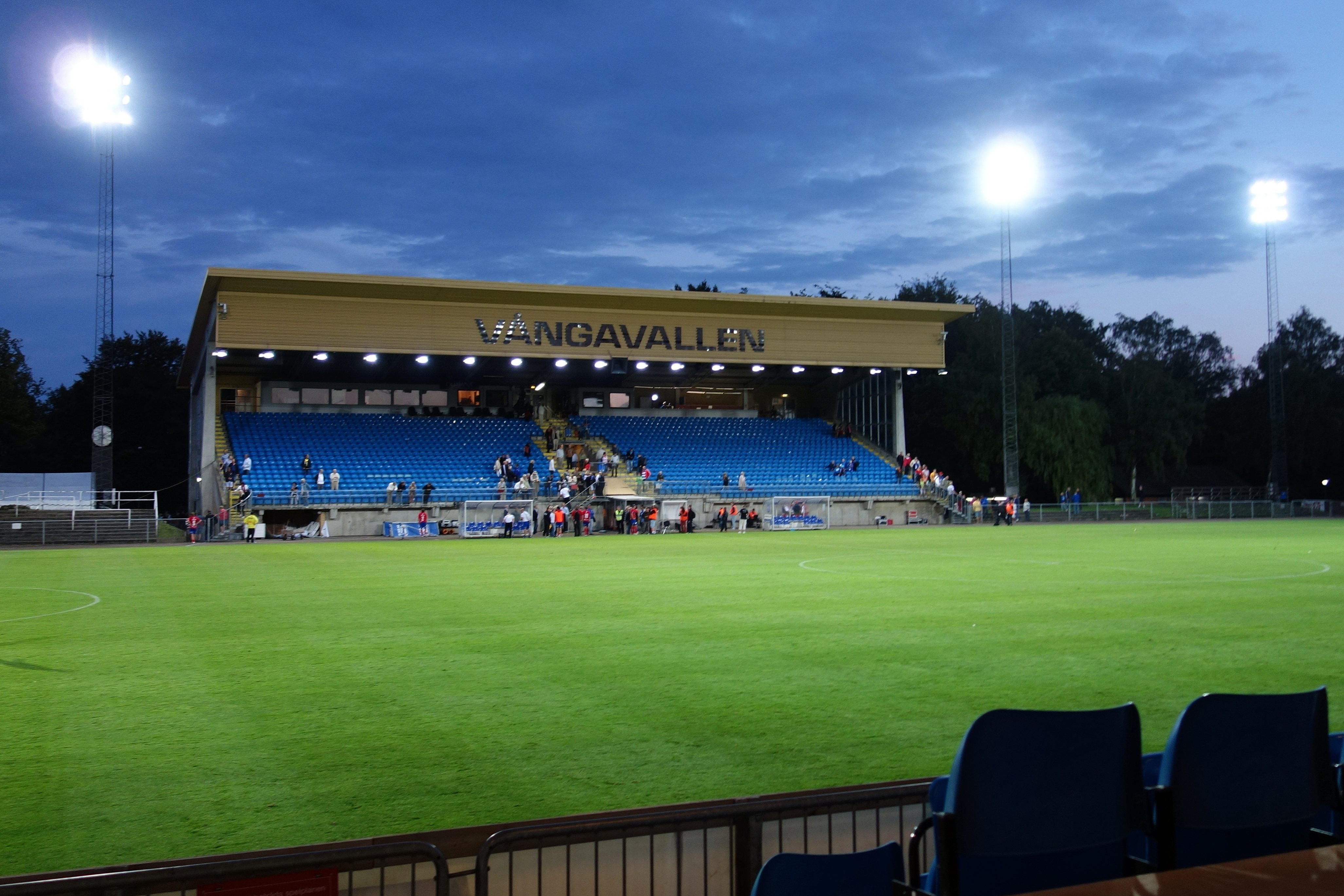 Vångavallens huvudläktare i strålkastarsken efter Trelleborgs förlust mot Öster i Superettan 2012.